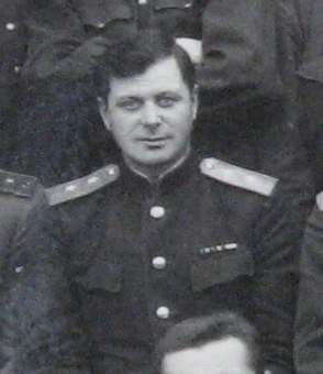 Николай Буянский, 15-16 октября 1944 г. - на совещании политработников